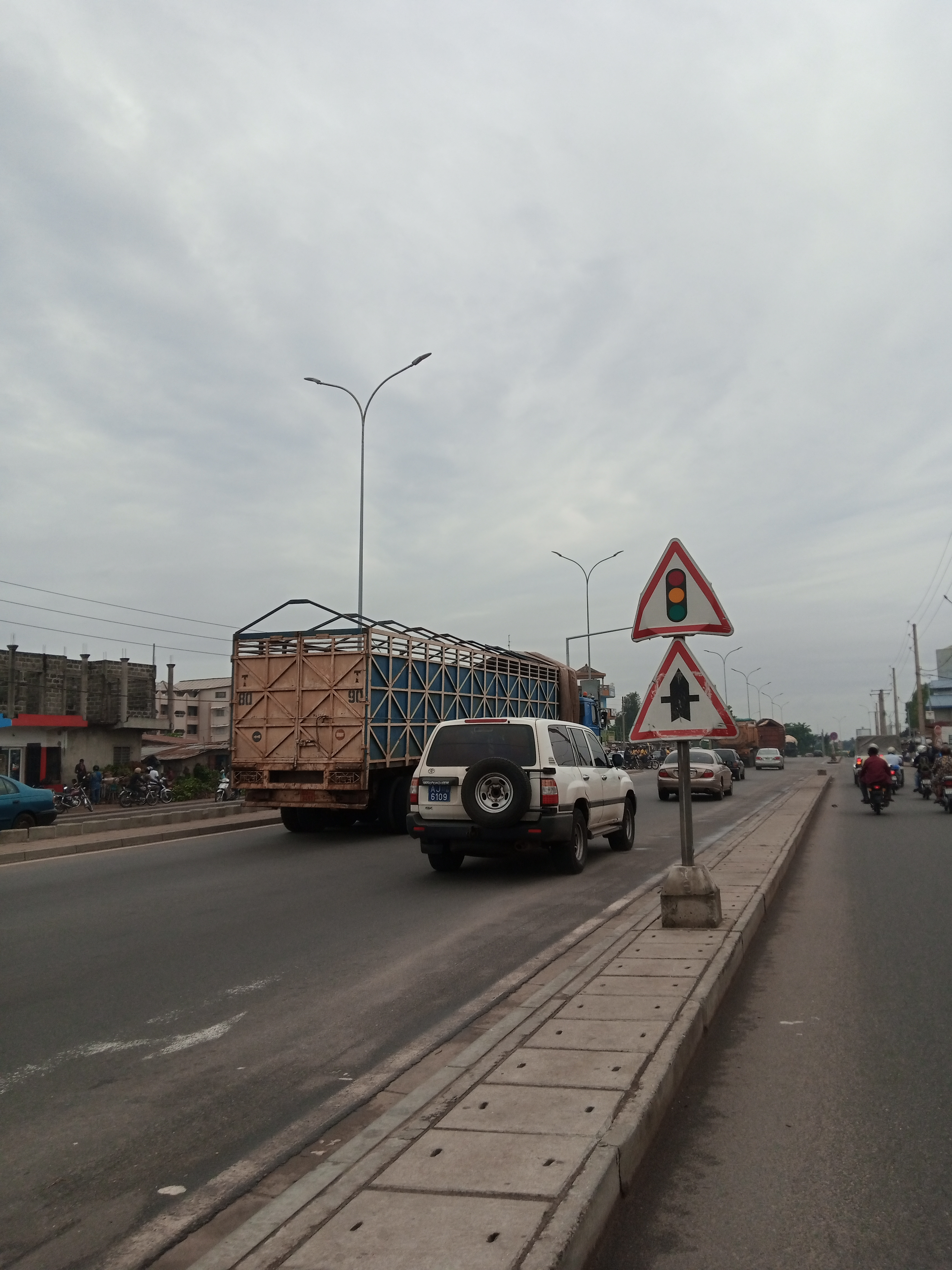 dédoublement This is an image with the theme "Africa on the Move or Transport" from: Benin